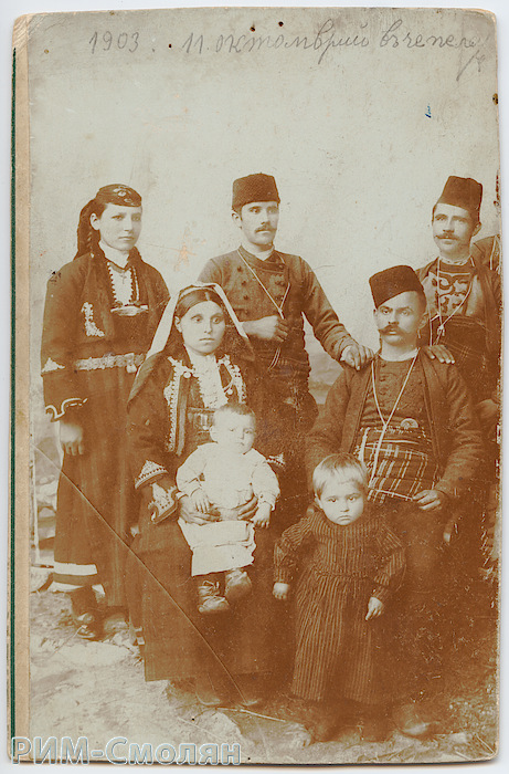 Тодор Хвойнев, седнал, и първата му жена Мария Н. Щинкова, 11 октомври 1903 година, Чепеларе, след аферата на Тодоровден в село Левочево. РИМ Смолян, Инв. № В – 00130